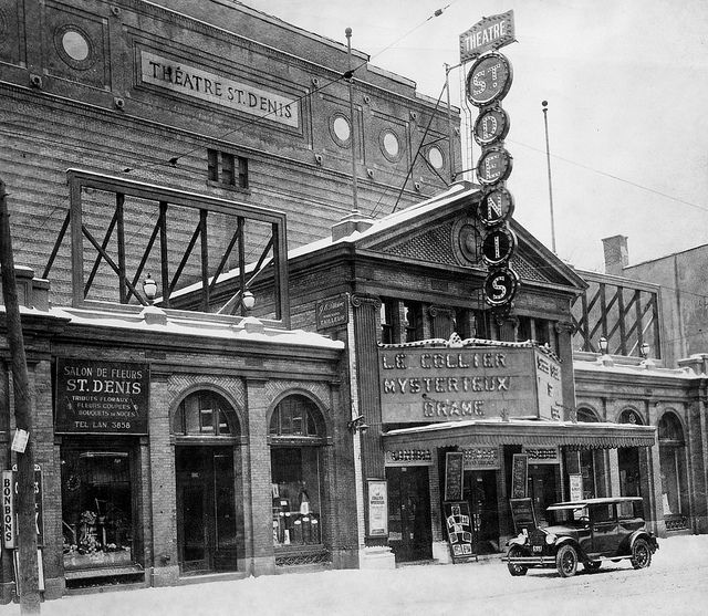 Le Théâtre Saint-Denis, Montréal, vers 1925